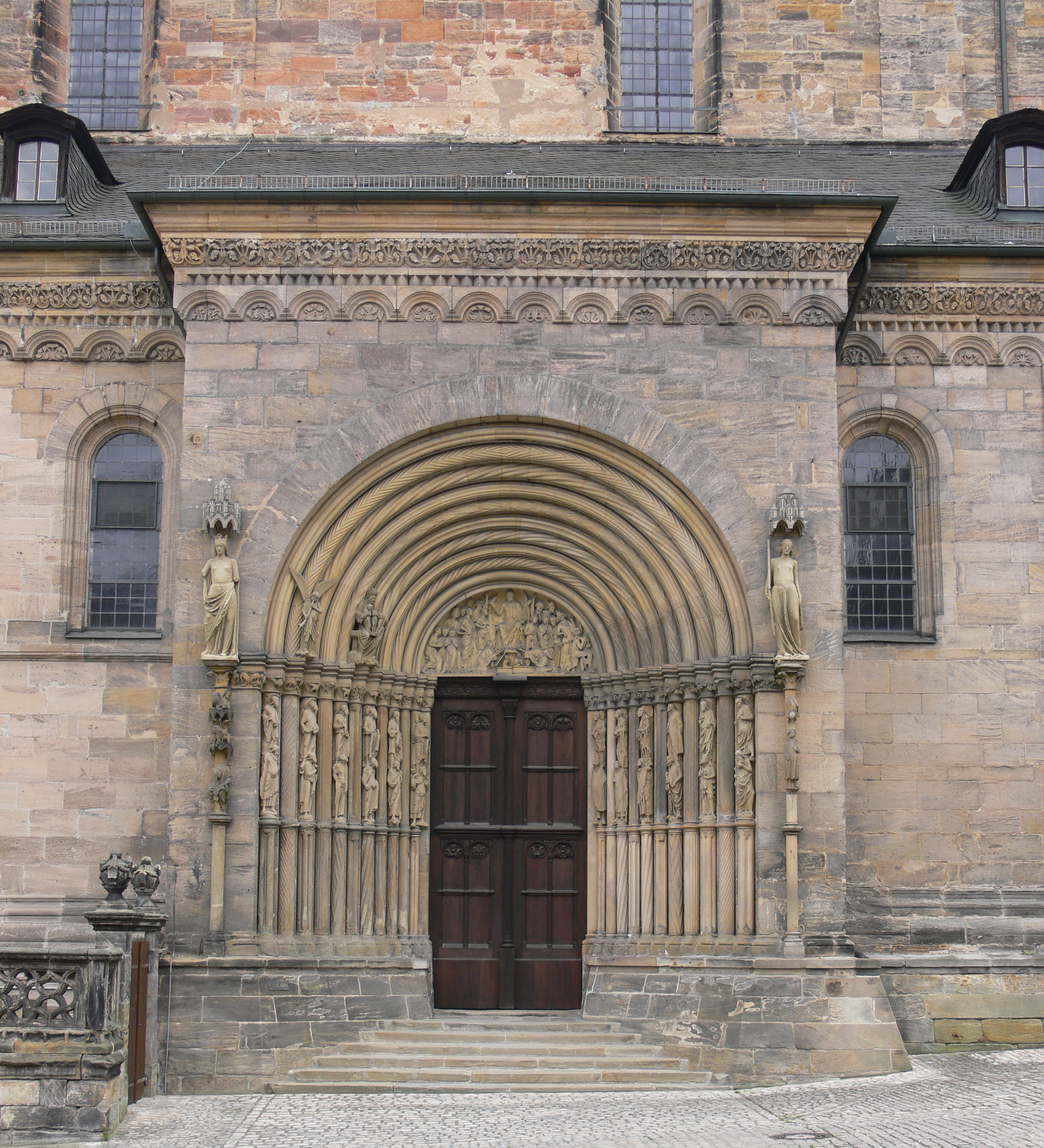 Bamberg, Dom St. Peter und St. Georg Fürstenportal